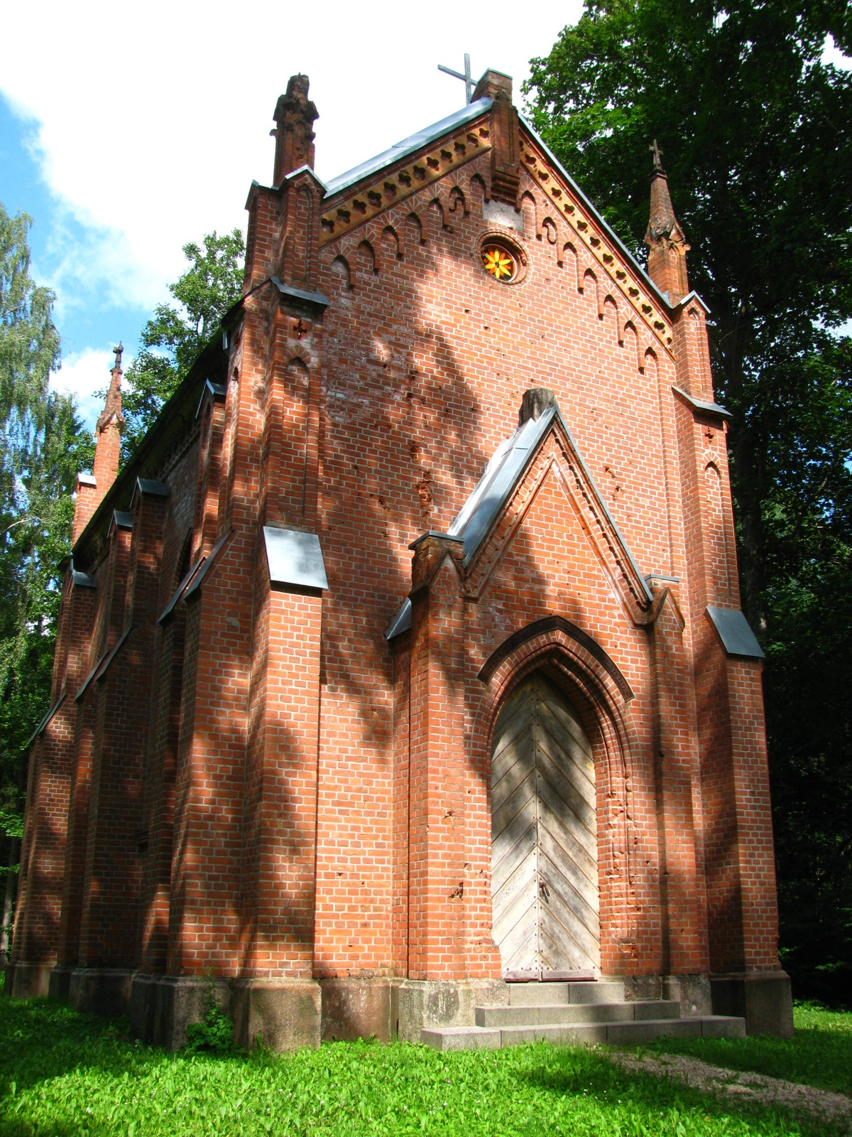 Riidaja mõisa kabel